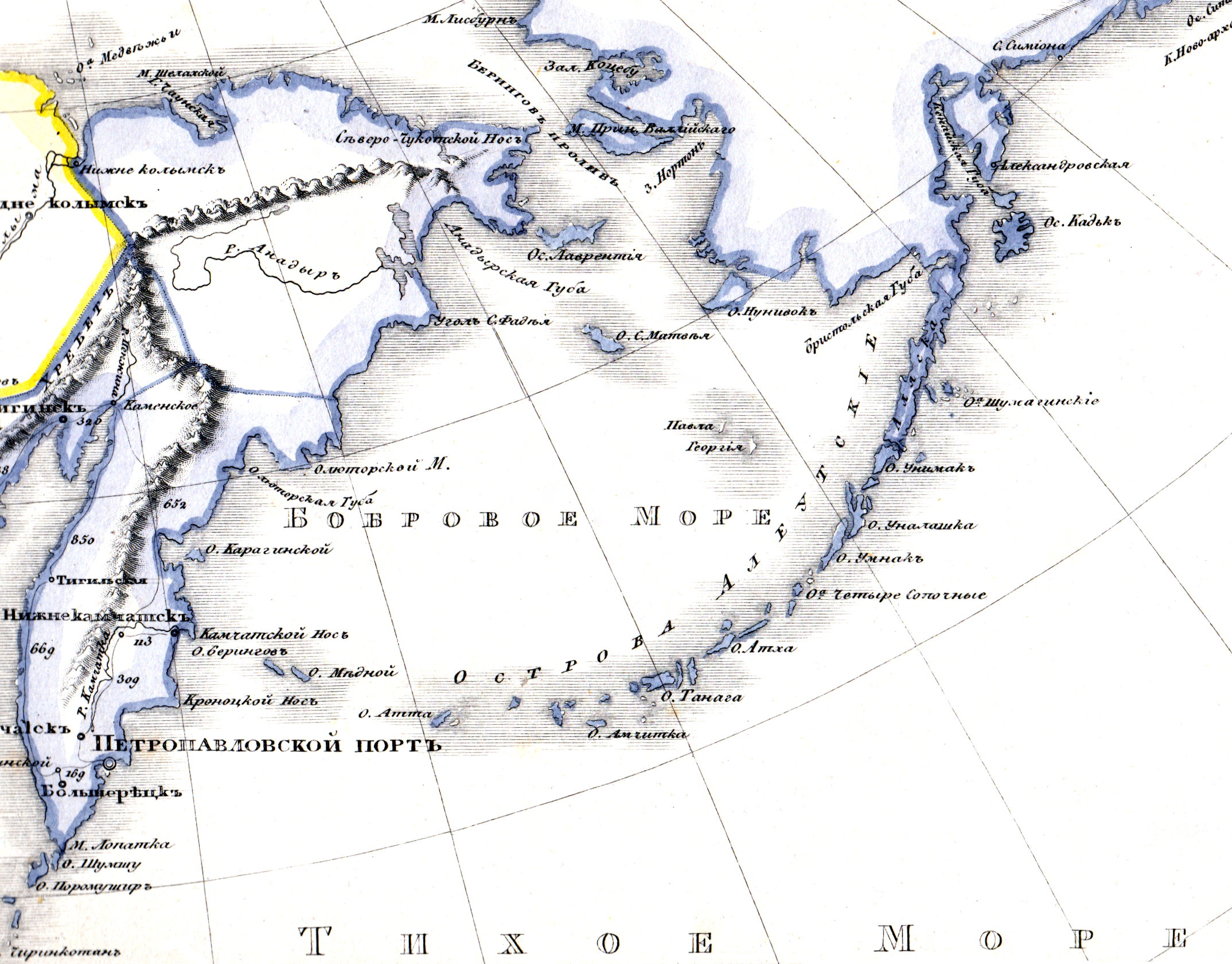 Часть карты с Бобровым морем. Новая географическая дорожная карта Российской империи с означением 57 губерний, 8 областей, 4 градоначальств, 4 управлений, 8 воеводств, Земли Большой и Малой Кабарды и Киргиз Кайсаков. С показанием учебных округов, городов, примечательных мест, водяных сообщений, почтовых проезжих дорог, и расстояние между оными в верстах. Составлена и издана служащим в Военно-типографическом депо капитаном Медниковым. 1833. С.-Петербург. Издание сей карты служит единственно руководством преподавающим и учащимся Российской географии по курсу Г. Г. Профессор. Арсеньева и Зяславского и для путешествующих по России.